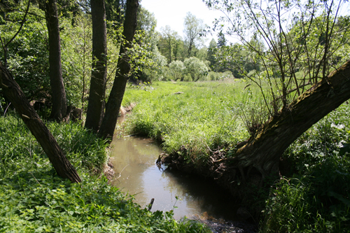 Čeminský potok mezi Košeticemi a Rakovnou, levostranný přítok řeky Mže, okres Plzeň-sever, Česká Republika